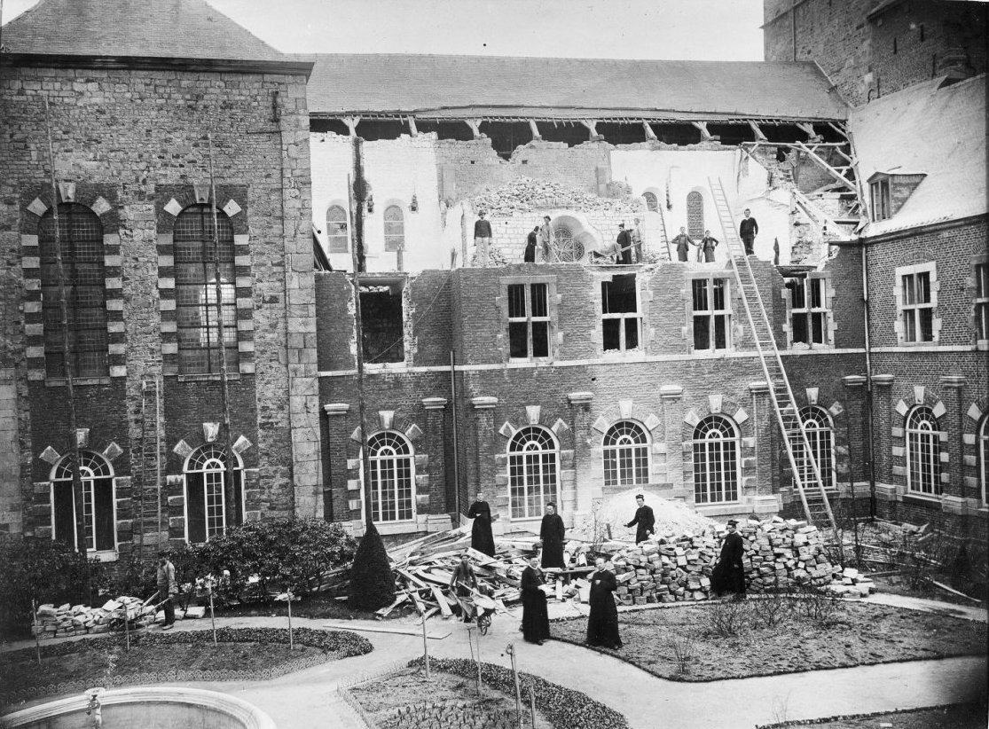 Abdij: Abdij